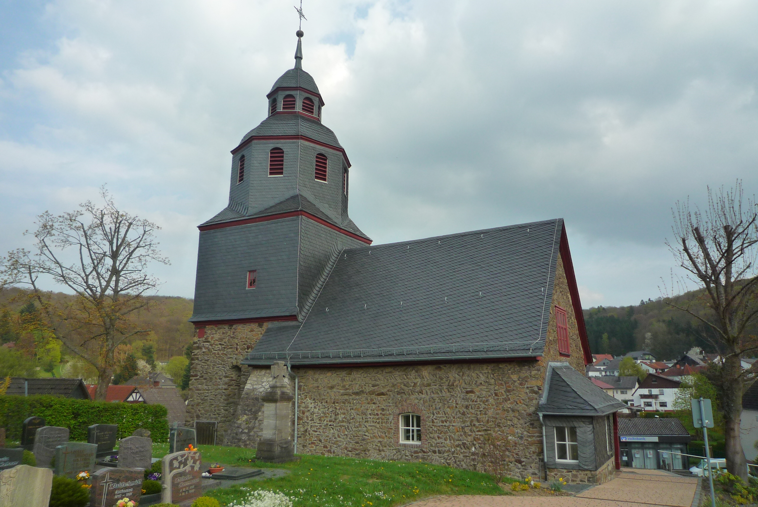 Evangelische Kirche Krumbach, Gemeinde Biebertal, Landkreis Gießen, Hessen, Deutschland